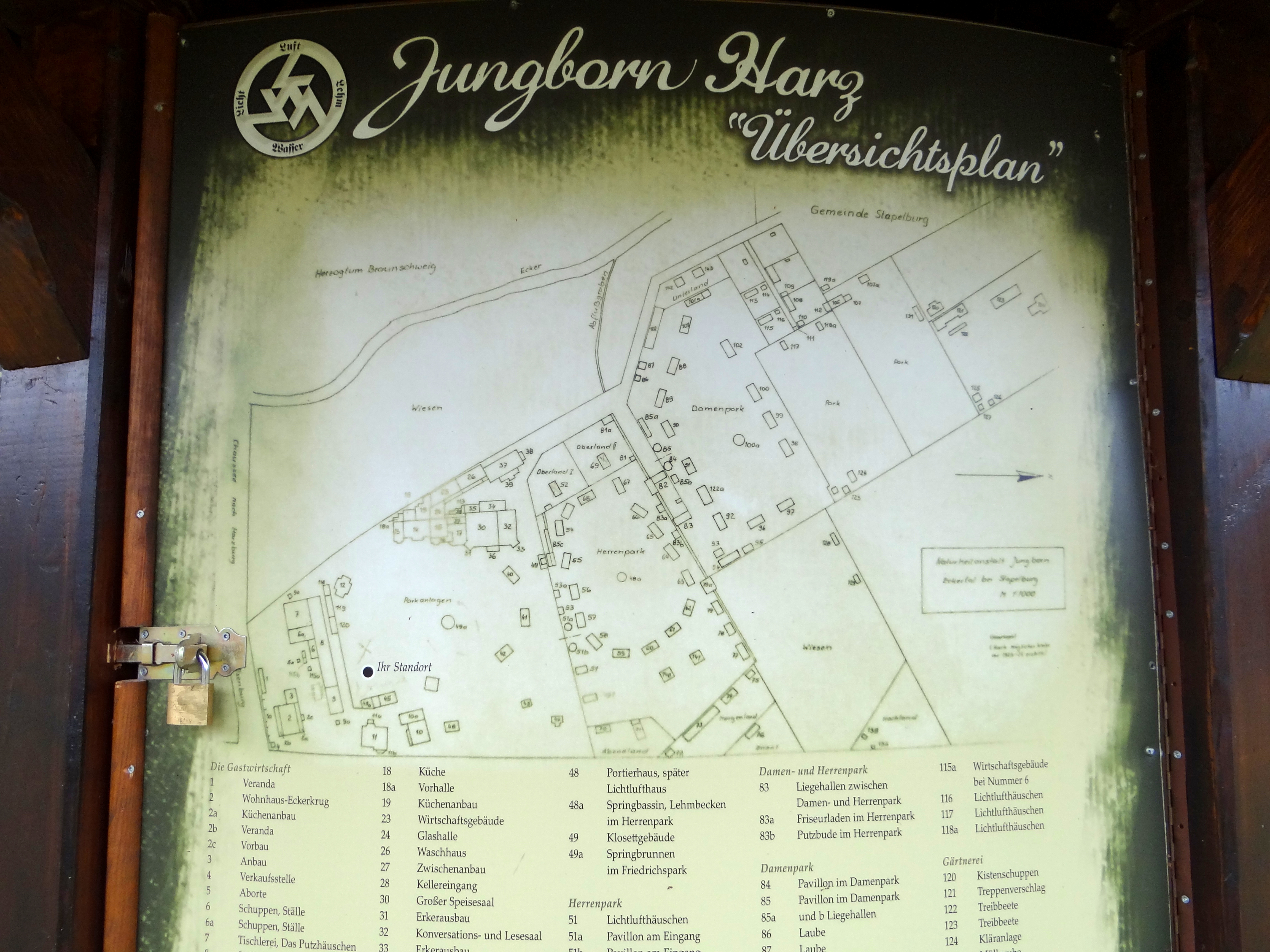 Informationswand vermutlich des Fördervereins Jungborn auf dem Gelände im Eckertal bei Stapelburg mit einer Übersicht des früheren Geländes.